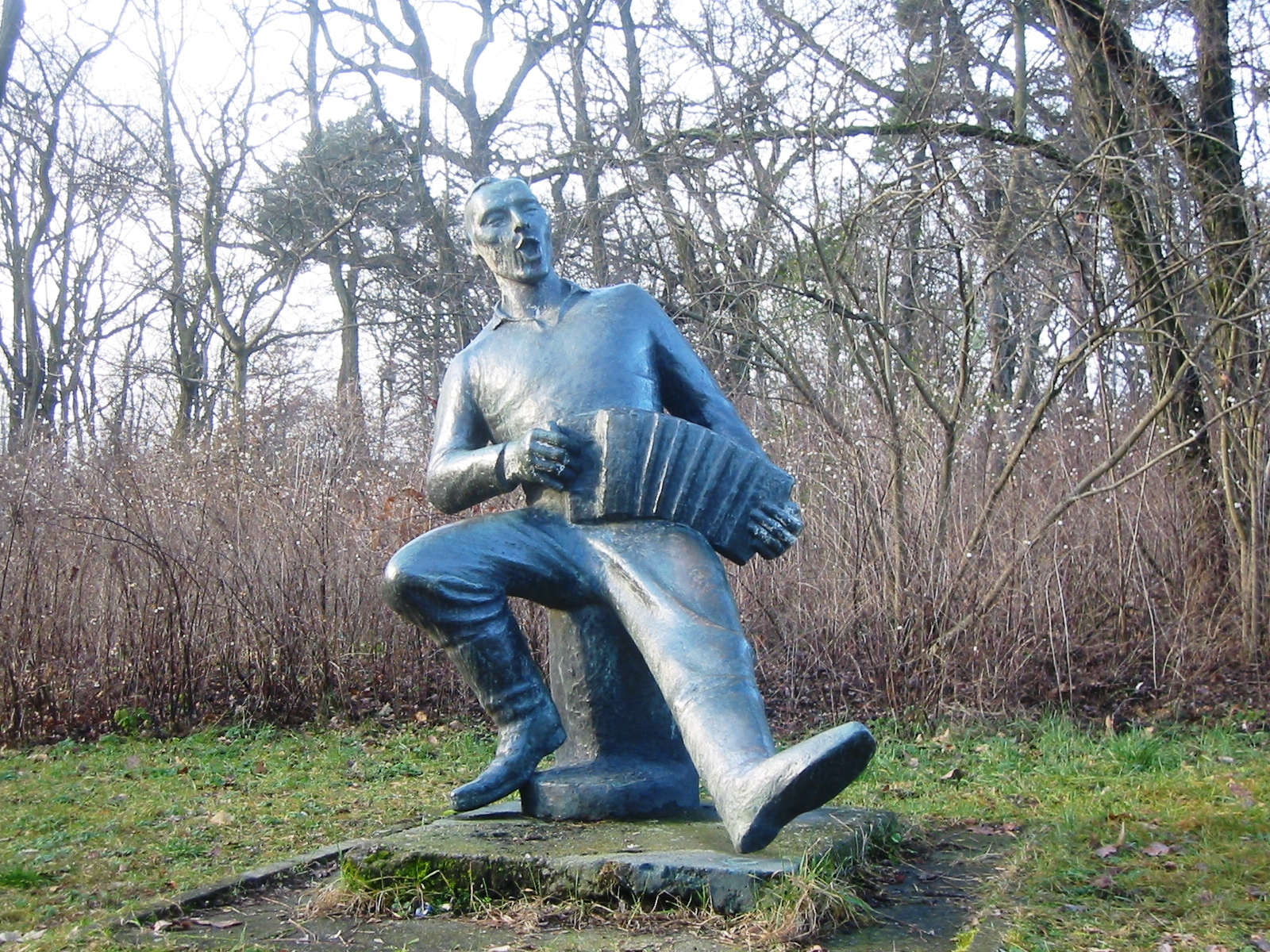 Skulptur "Harmonikaspieler" von Hans Hennig im Bellevuepark in Berlin-Köpenick